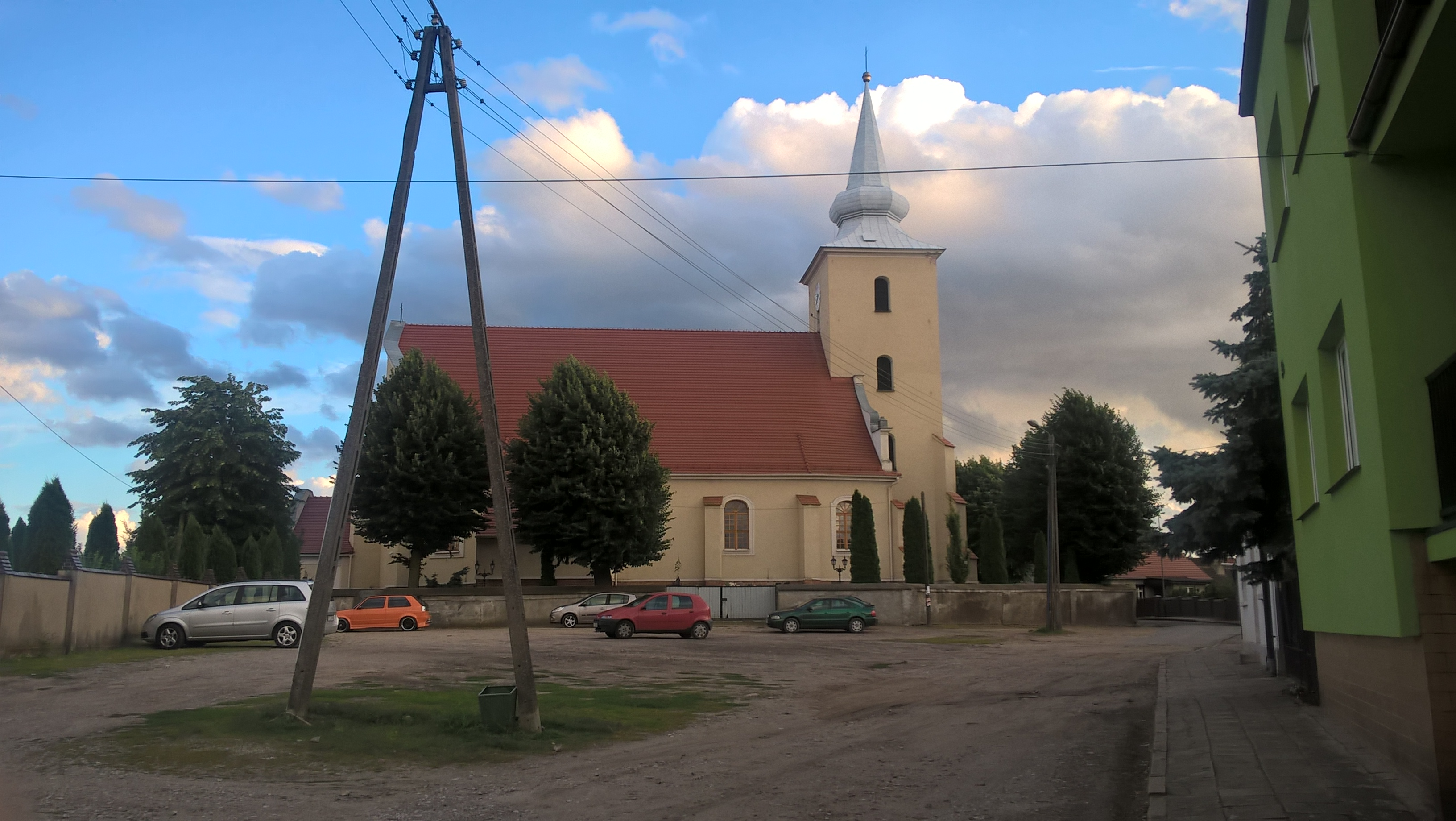 Kościół w Ostrorogu widok od strony parkingu